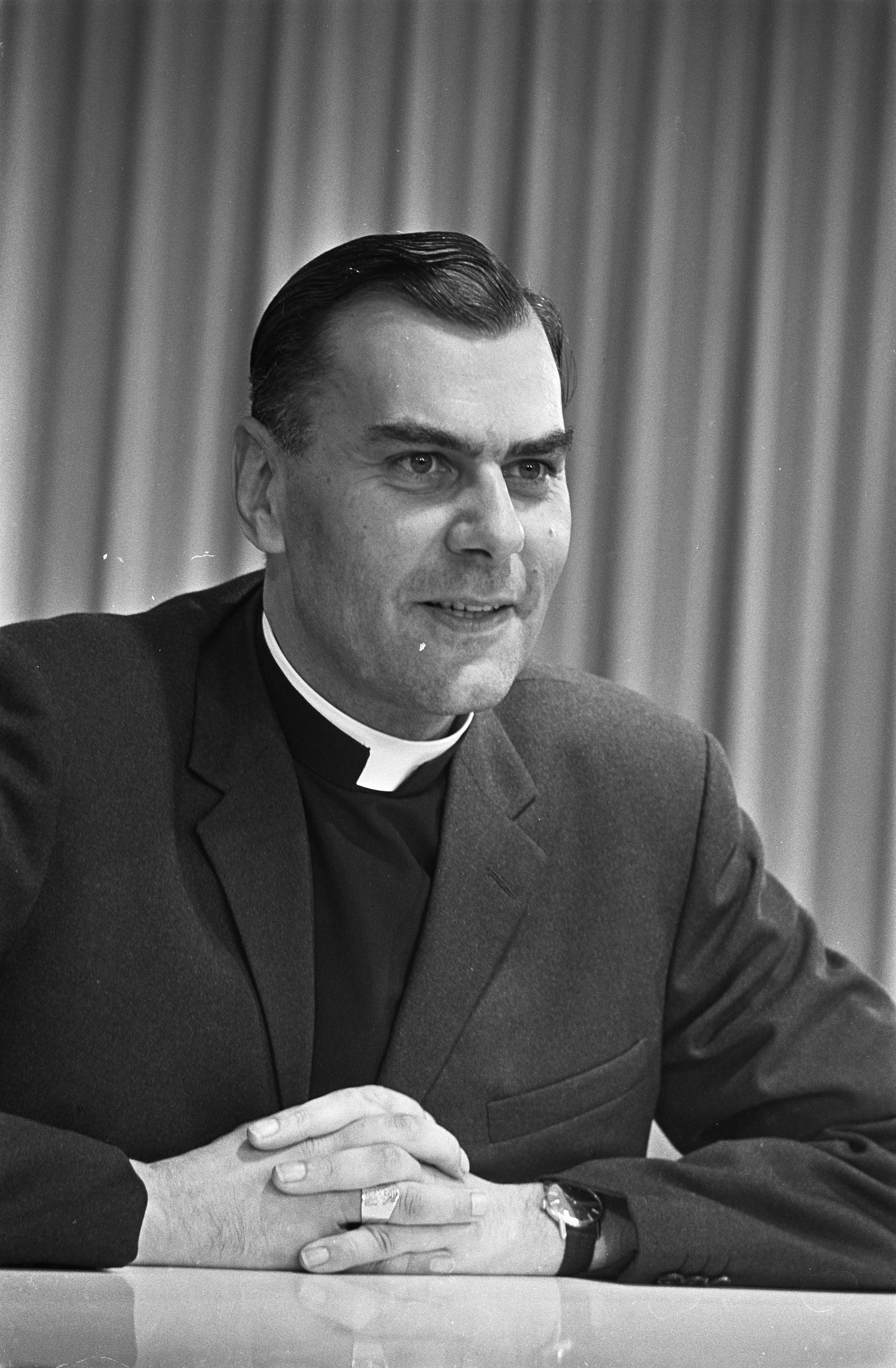 Collectie / Archief : Fotocollectie Anefo Reportage / Serie : [ onbekend ] Beschrijving : Mgr. Bluyssen terug uit Rome mgr. Bluyssen (kop) tijdens persconferentie Datum : 19 oktober 1968 Trefwoorden : KOPPEN, aankomsten, persconferenties Persoonsnaam : Bluyssen, Johannes Fotograaf : Nijs, Jac. de / Anefo Auteursrechthebbende : Nationaal Archief Materiaalsoort : Negatief (zwart/wit) Nummer archiefinventaris : bekijk toegang 2.24.01.05 Bestanddeelnummer : 921-7777